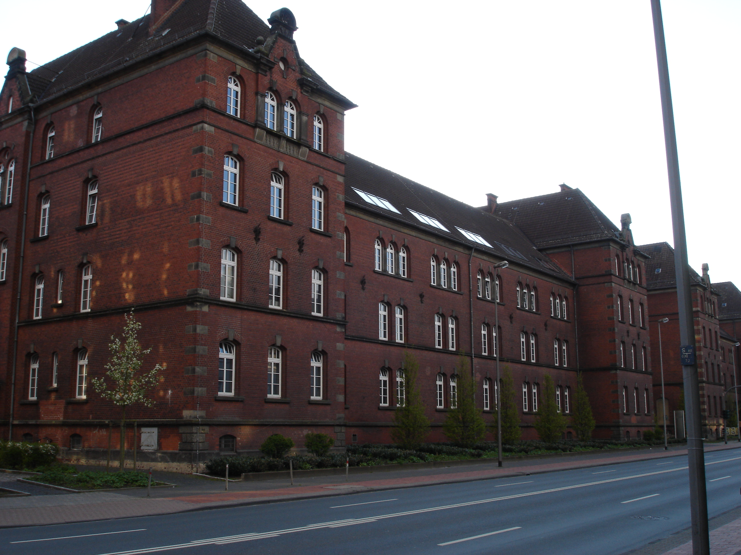 Gebäude des Fachbereichs Architektur der Fachhochschule Münster in Münster, Westfalen, Deutschland